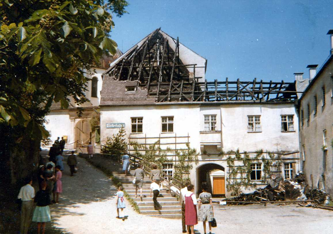 Kloster Andechs 1964 nach dem Brand